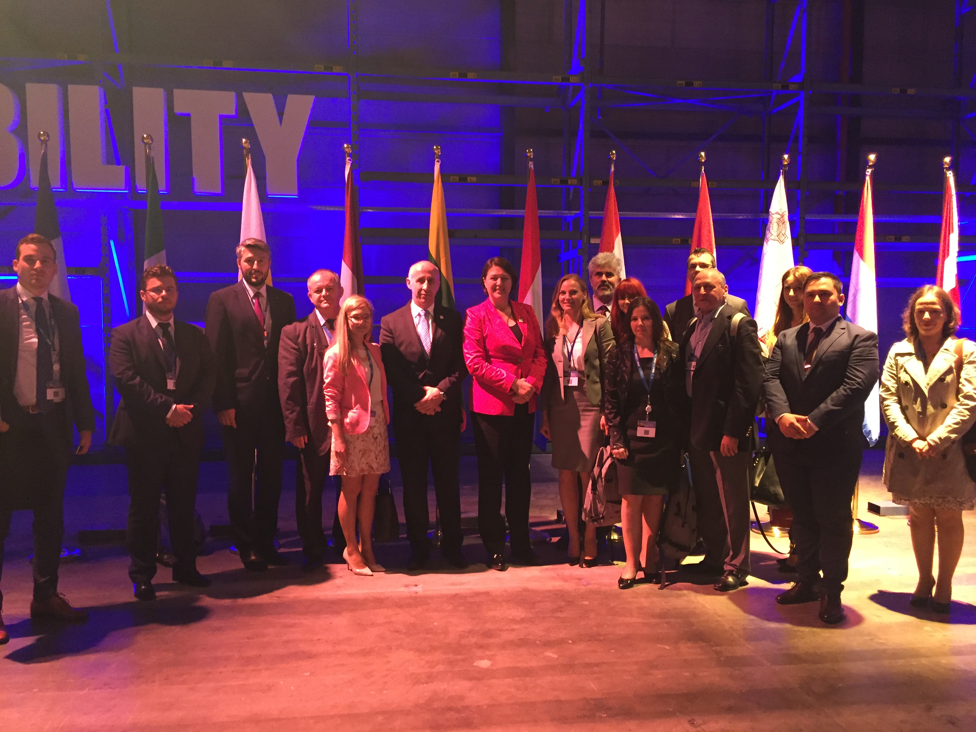 Impreună cu Violeta Bulc și echipa care a lansat la TEN-T days, 16 proiecte de infrastructură ce urmau a fi finanțate din planul Junker, plasând România pe primul loc al apelului respectiv